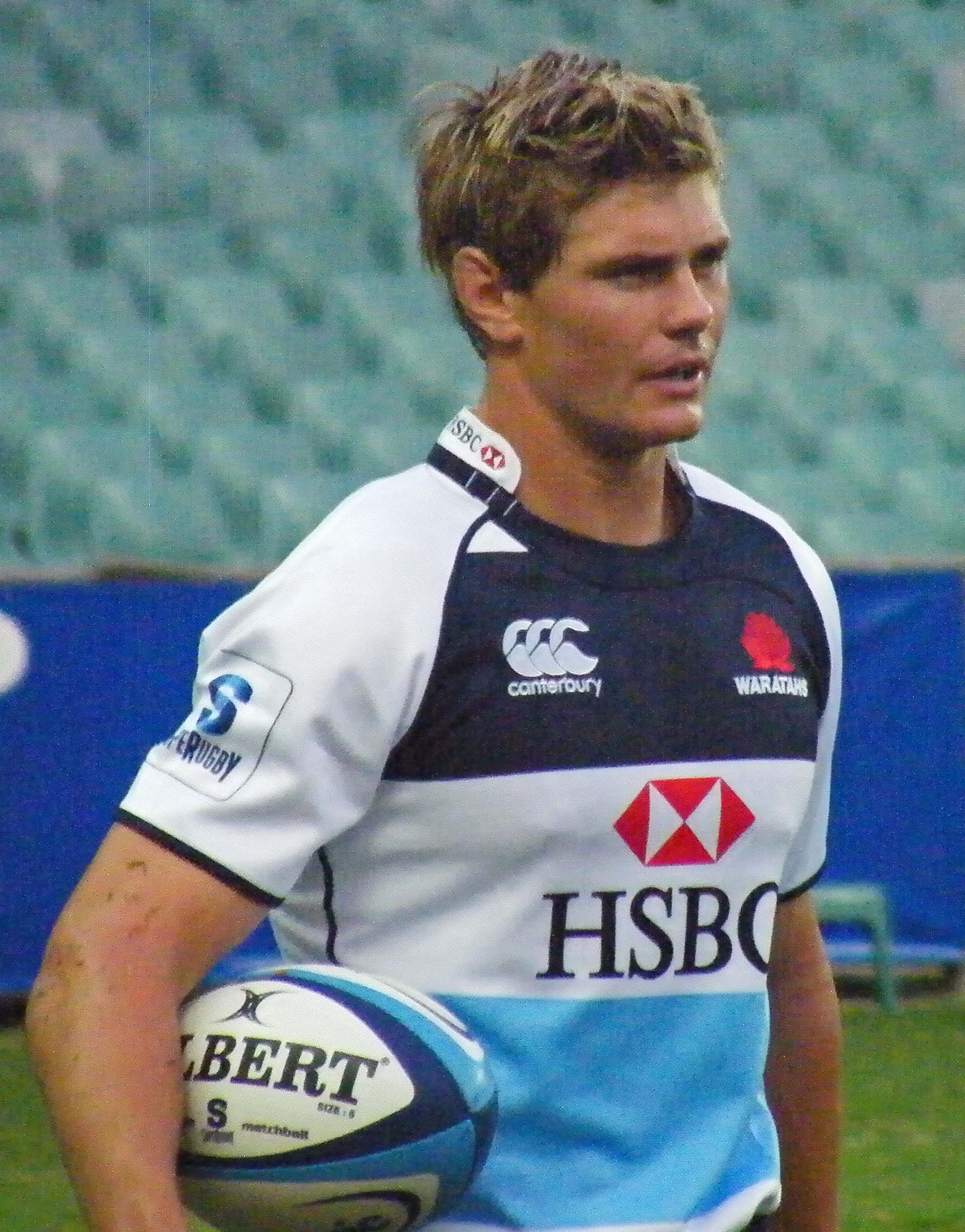 Berrick barnes